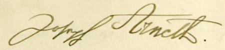 Signatur von Josef Arneth in der unter "Quelle" angegebenen Kriegsstammliste zur Bestätigung der Belehrung auf Ansprüche im Zuge seiner Entlassung aus der bayerischen Armee.